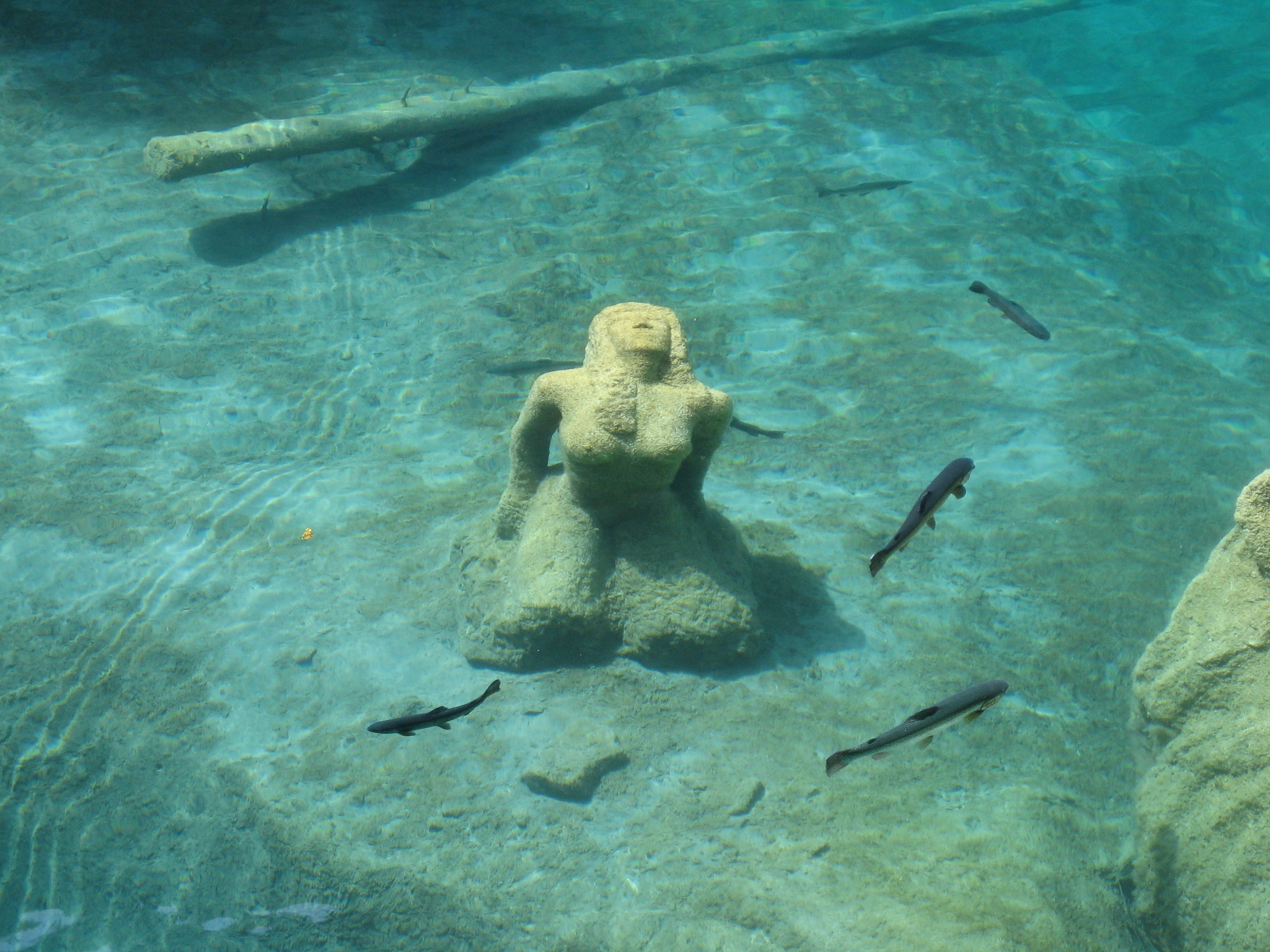 Statue von Raphael Fuchs im Blausee im Berner Oberland. Siehe auch Inschrift.